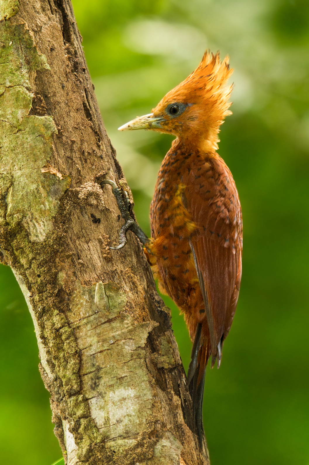 Sarapiqui, Heliconia Island, Costa Rica